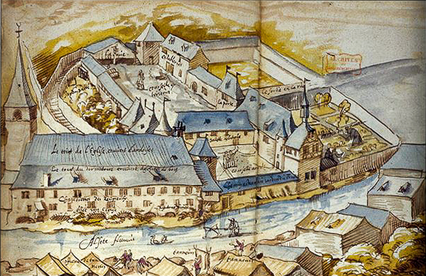 Original caption: “Die Abtei Neumünster in den Mauern des alten Sankt-Johann-Hospitals (1602).”